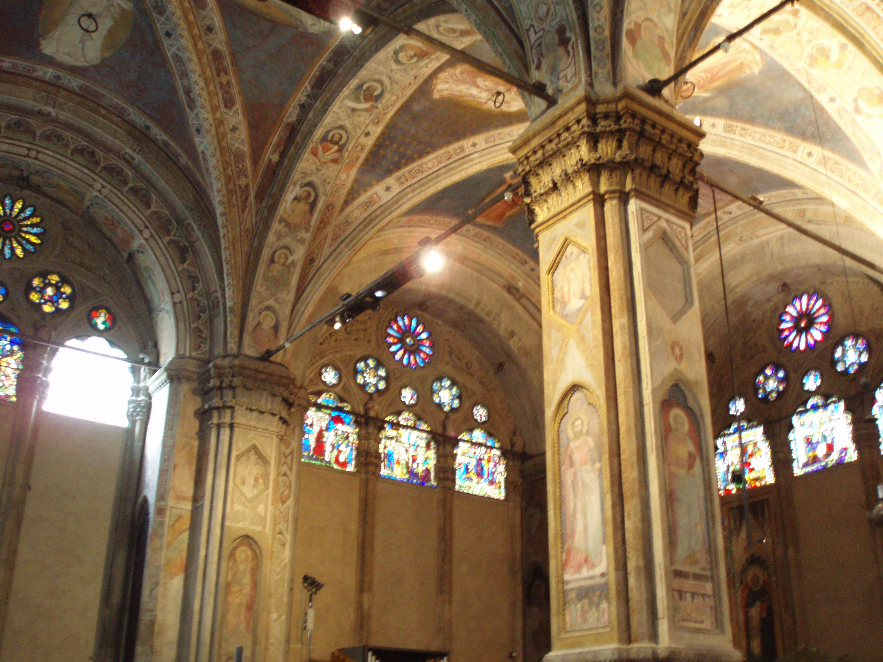 Orsanmichele